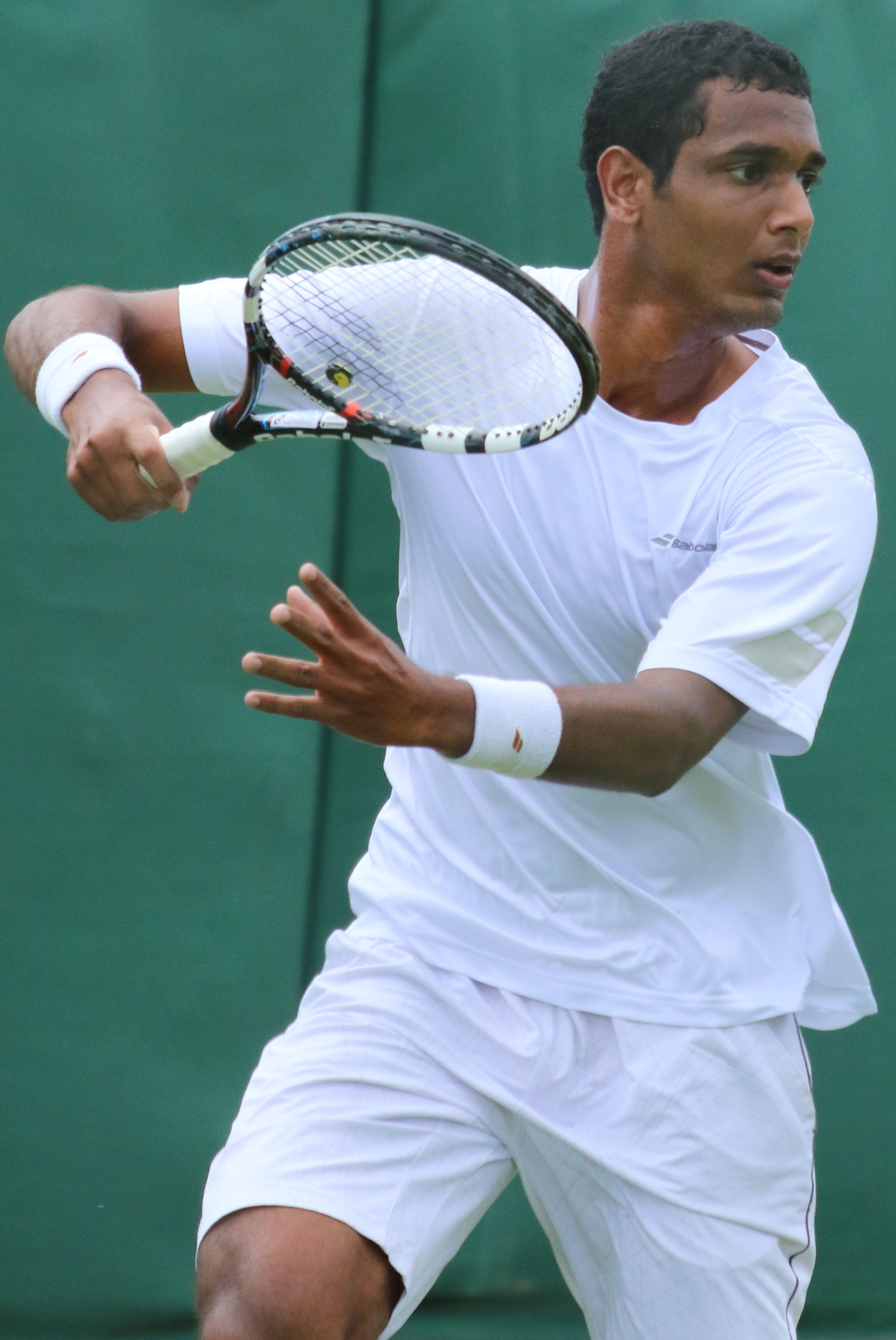 Ramanathan WMQ16 (3)